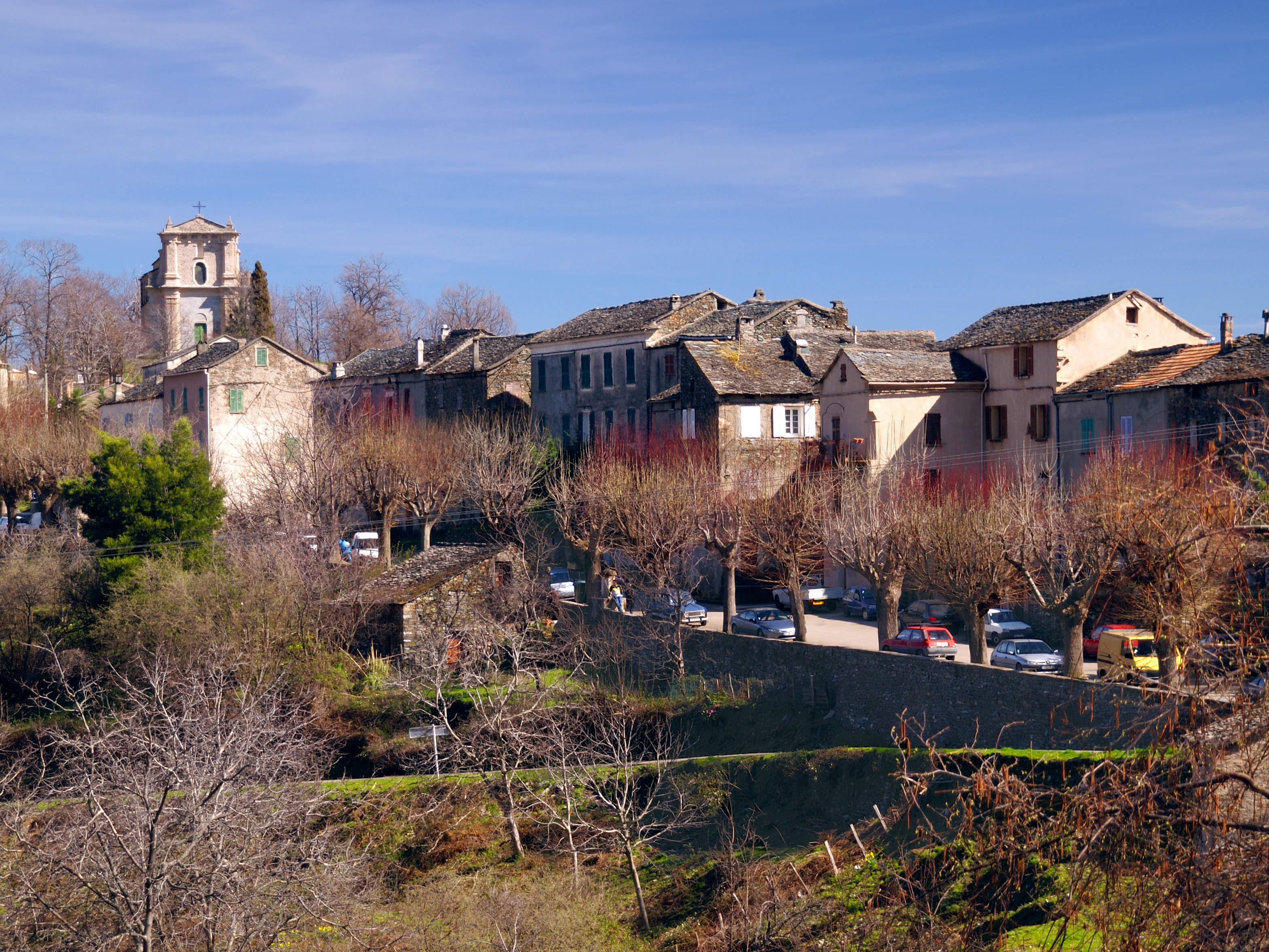 Giocatojo - Le village